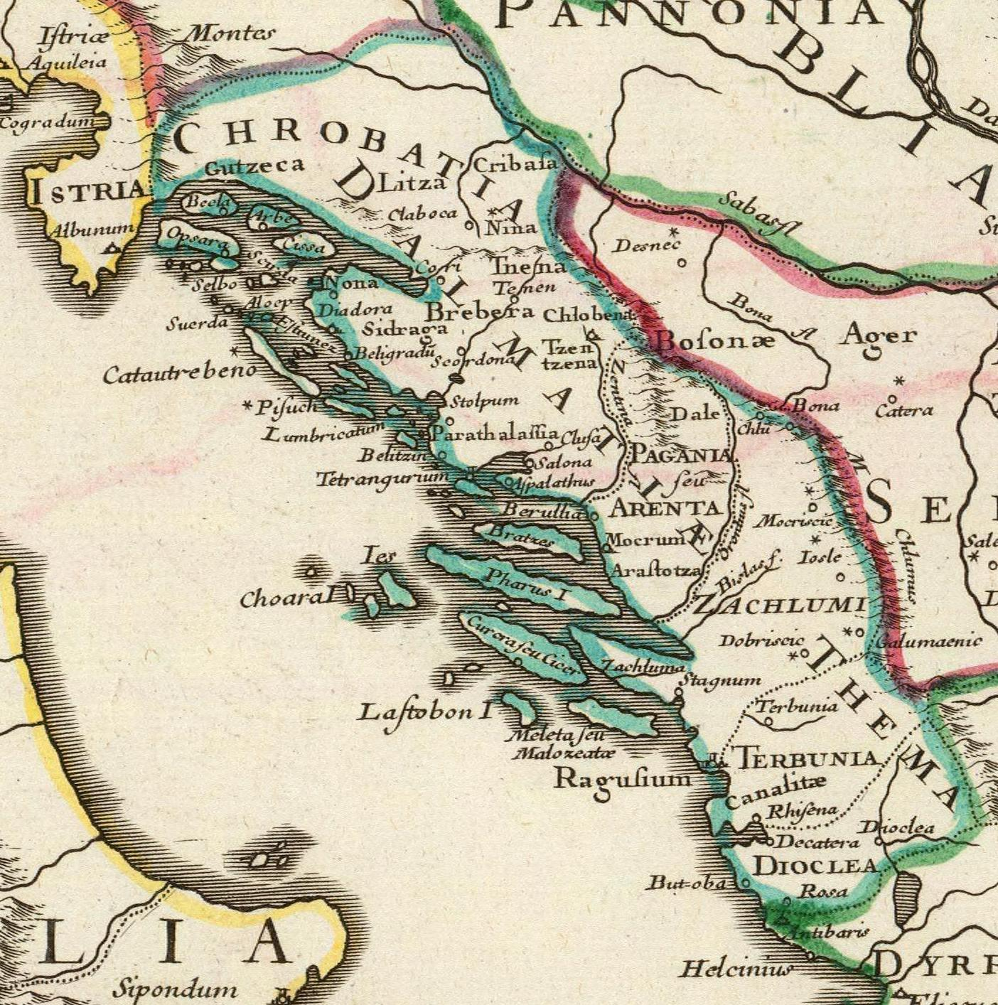 Imperii Orientalis et Circumjacentium Regionum, sub Constantino Porphyrogenito et ejus praedecessoribus descriptio. Auctore Guillelmo Del'Isle e Regia Scientiarum Academia, ad novam editionem Libri Constantini Porphyrogeniti de Administrando Imperio quae prodit studio Anselmi Bandurii, Monachi Benedictini Ragusini Melitensis cum ejus dem note et animadversionibus. (Paris : Guillelmo Del'Isle, 1715?).